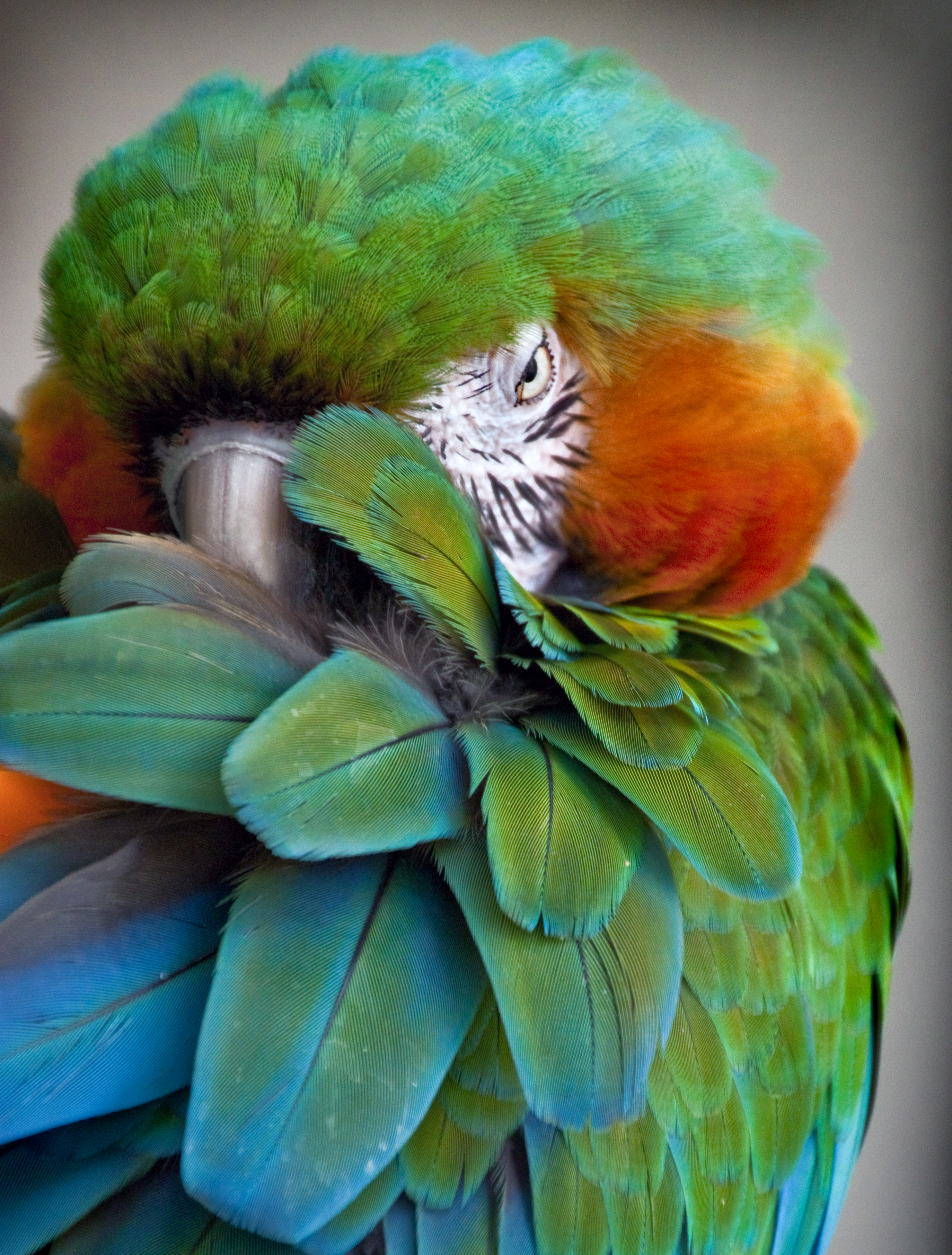 green_beauty1d